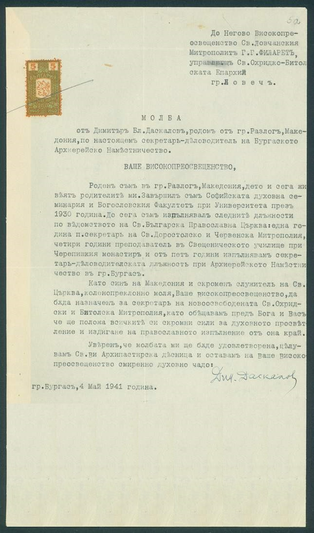 Молба от секретар-деловодителя на Бургаското архиерейско наместничество Димитър Бл. Даскалов до Ловчанския митрополит Филарет за назначаването му като секретар на новоосвободената Св. Охридска и Битолска Митрополия.